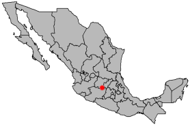 Localización del municipio de Acámbaro, Gto.